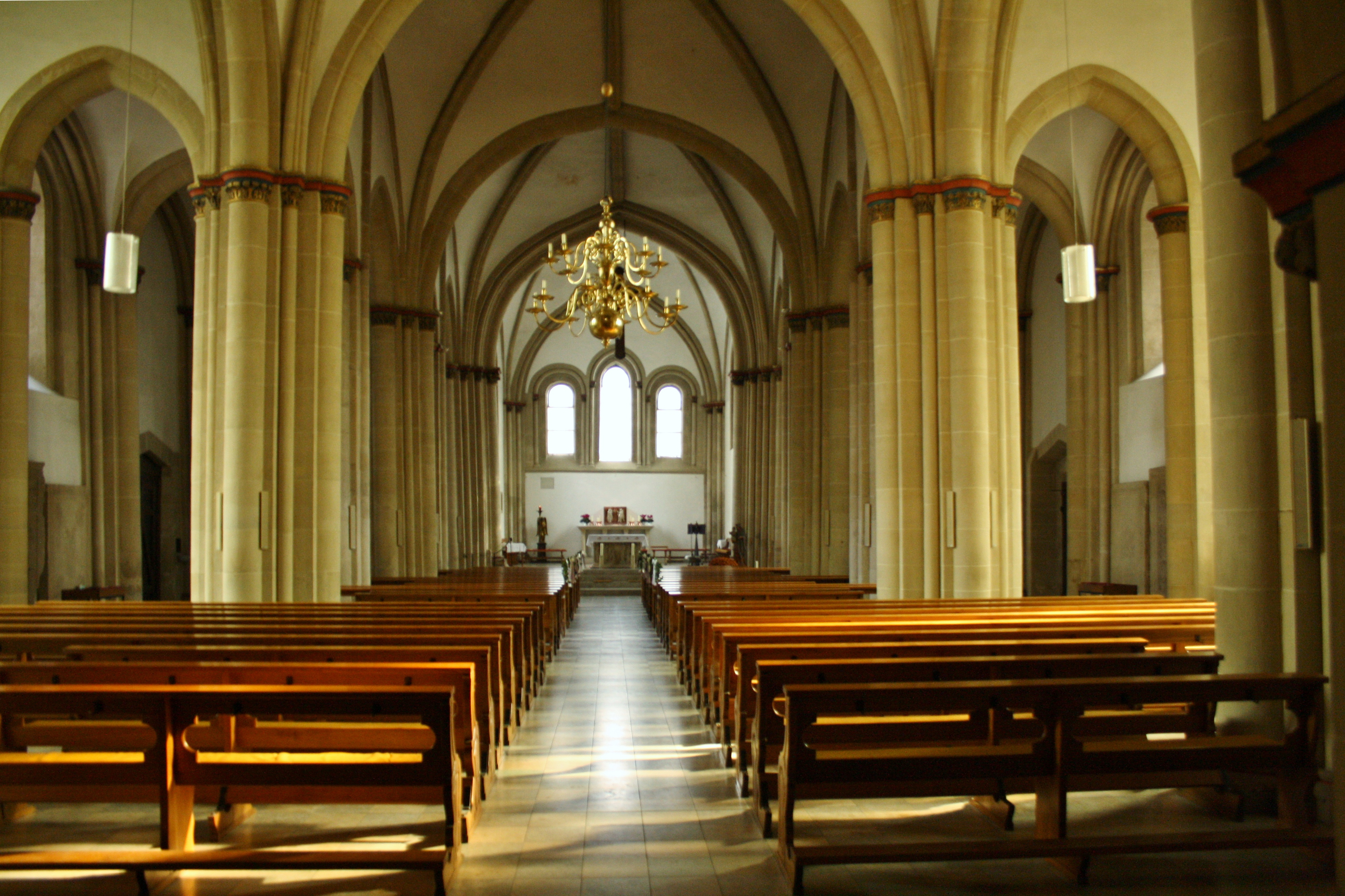 Innenraum der St.Brigida Kirche in Legden.